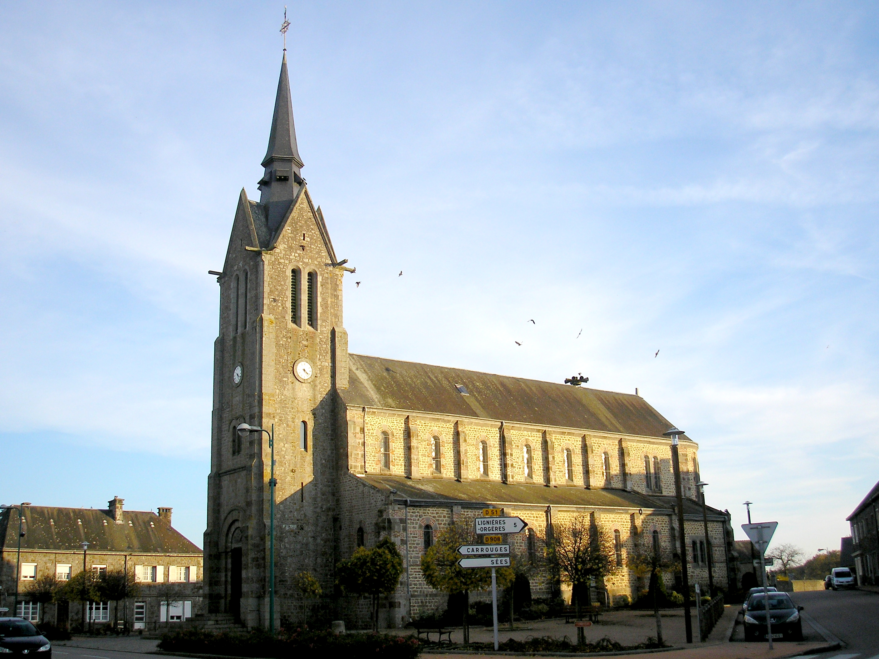 Joué-du-Bois (Normandie, France). L'église Saint-Jean-Baptiste.